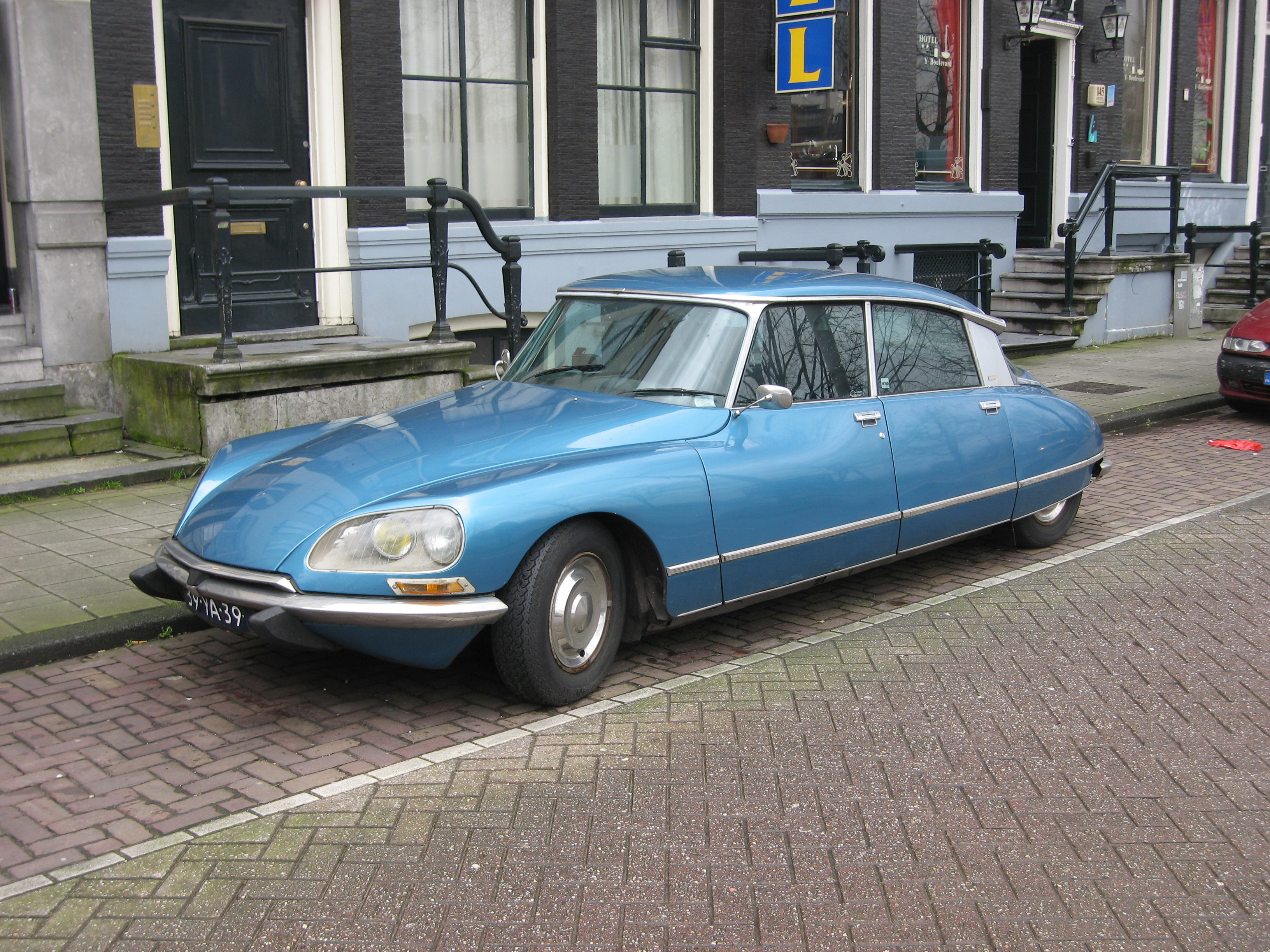 Citroen DS, taken in Amsterdam, Netherlands